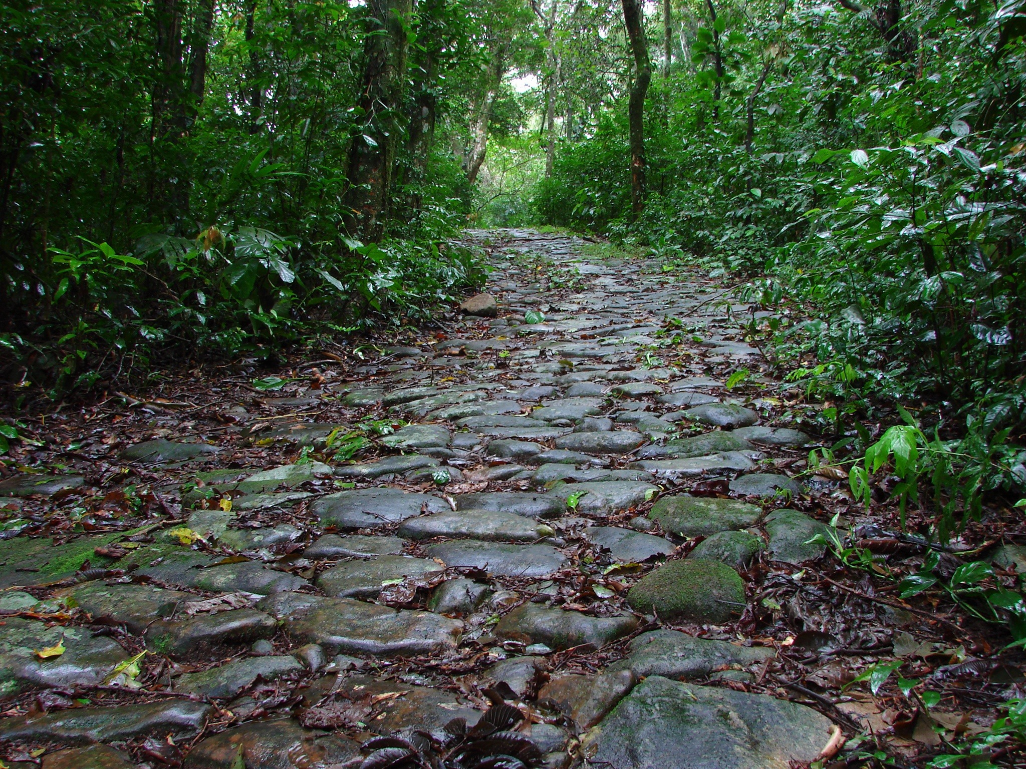 Estrada da Serra Velha entre Raiz da Serra e Lopes Trovão-RJ